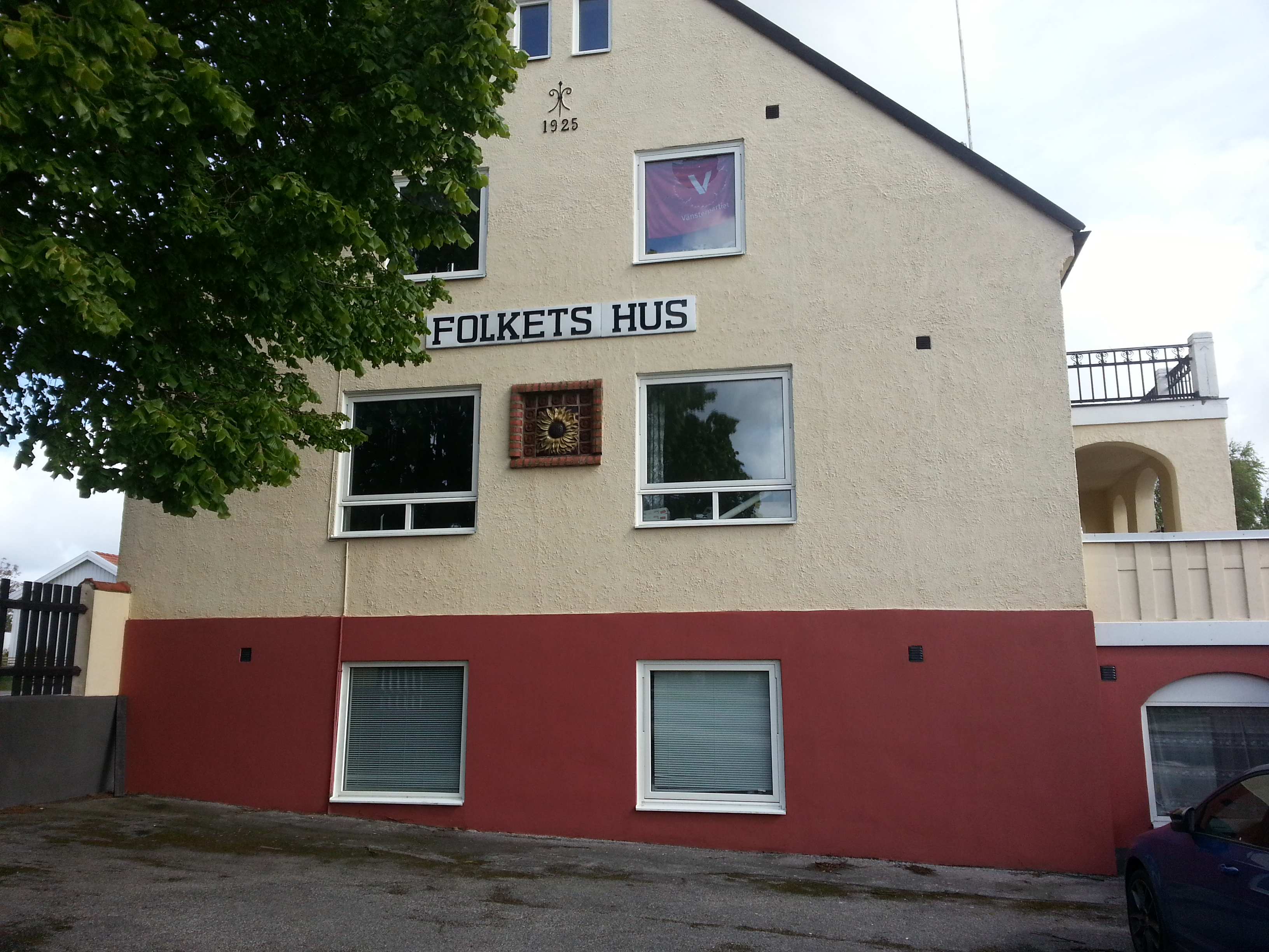 En bild av folkets hus i Skurup